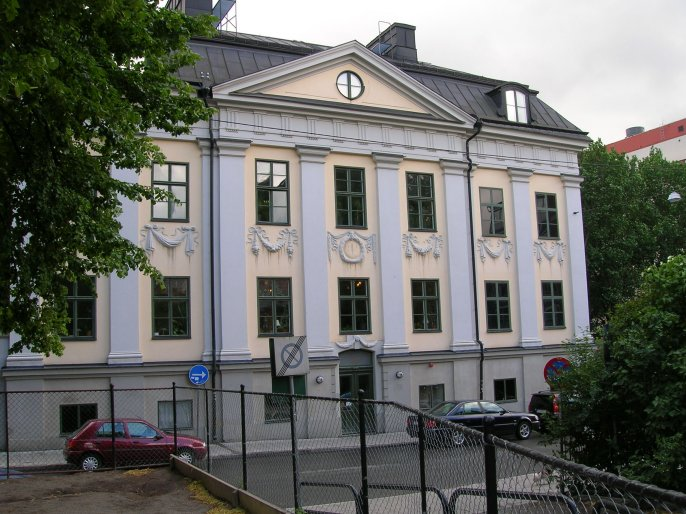 Reenstiernska palatset, built 1670, Stockholm, Sweden.